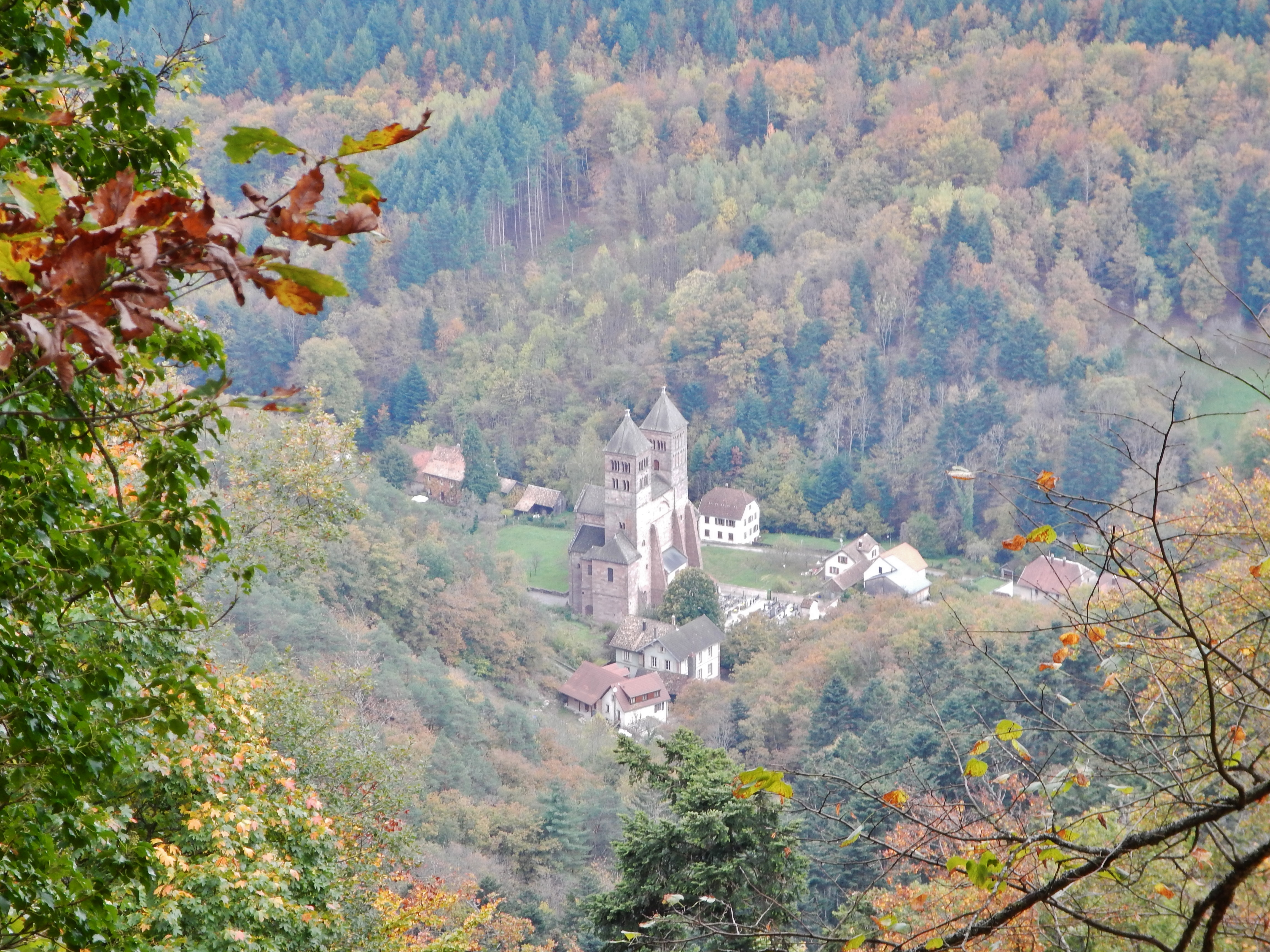 Murbach